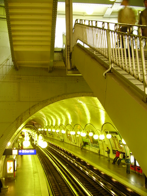 Metro de Paris ligne 4 station Cité